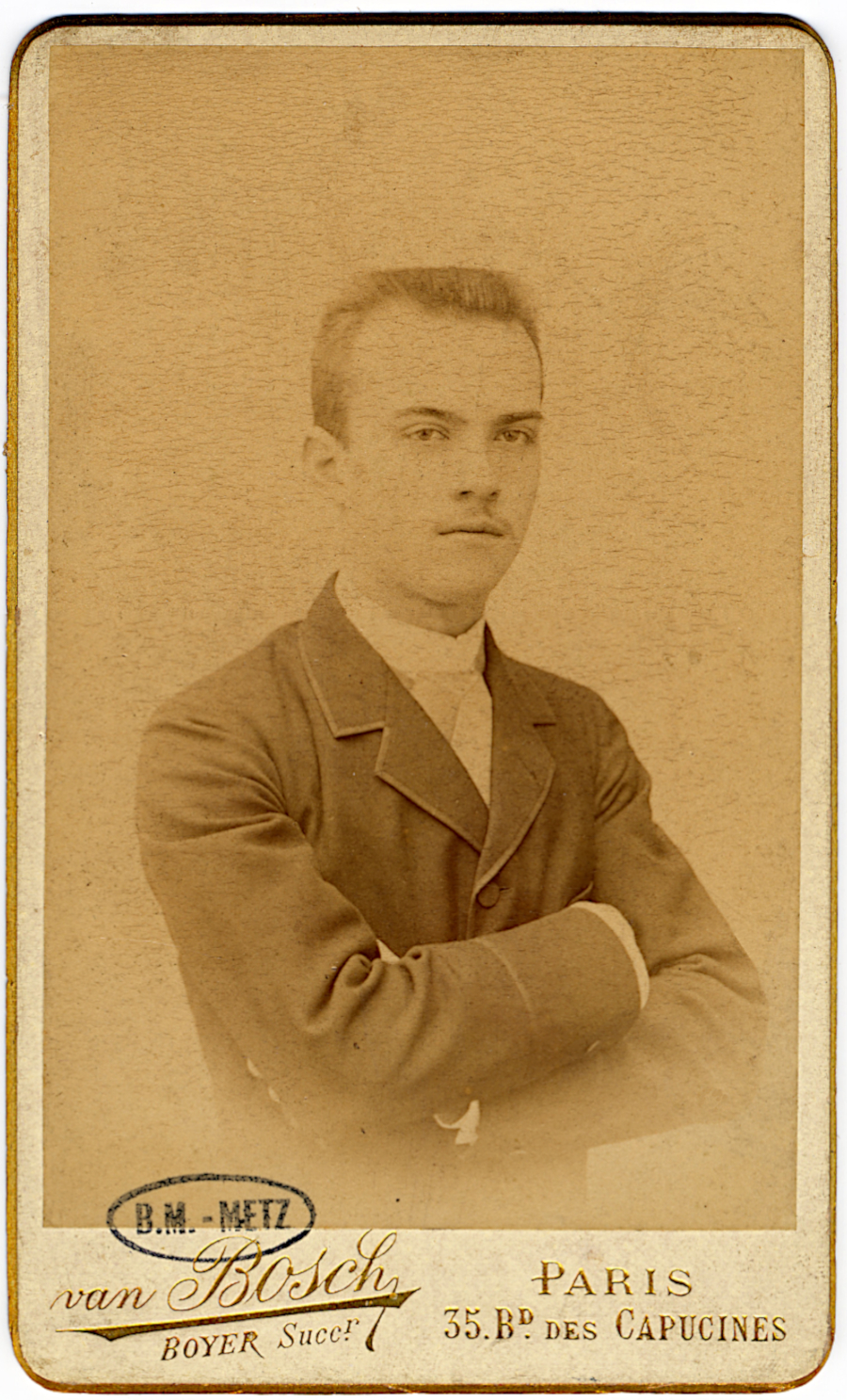 Georges Verlaine (1872-1924)